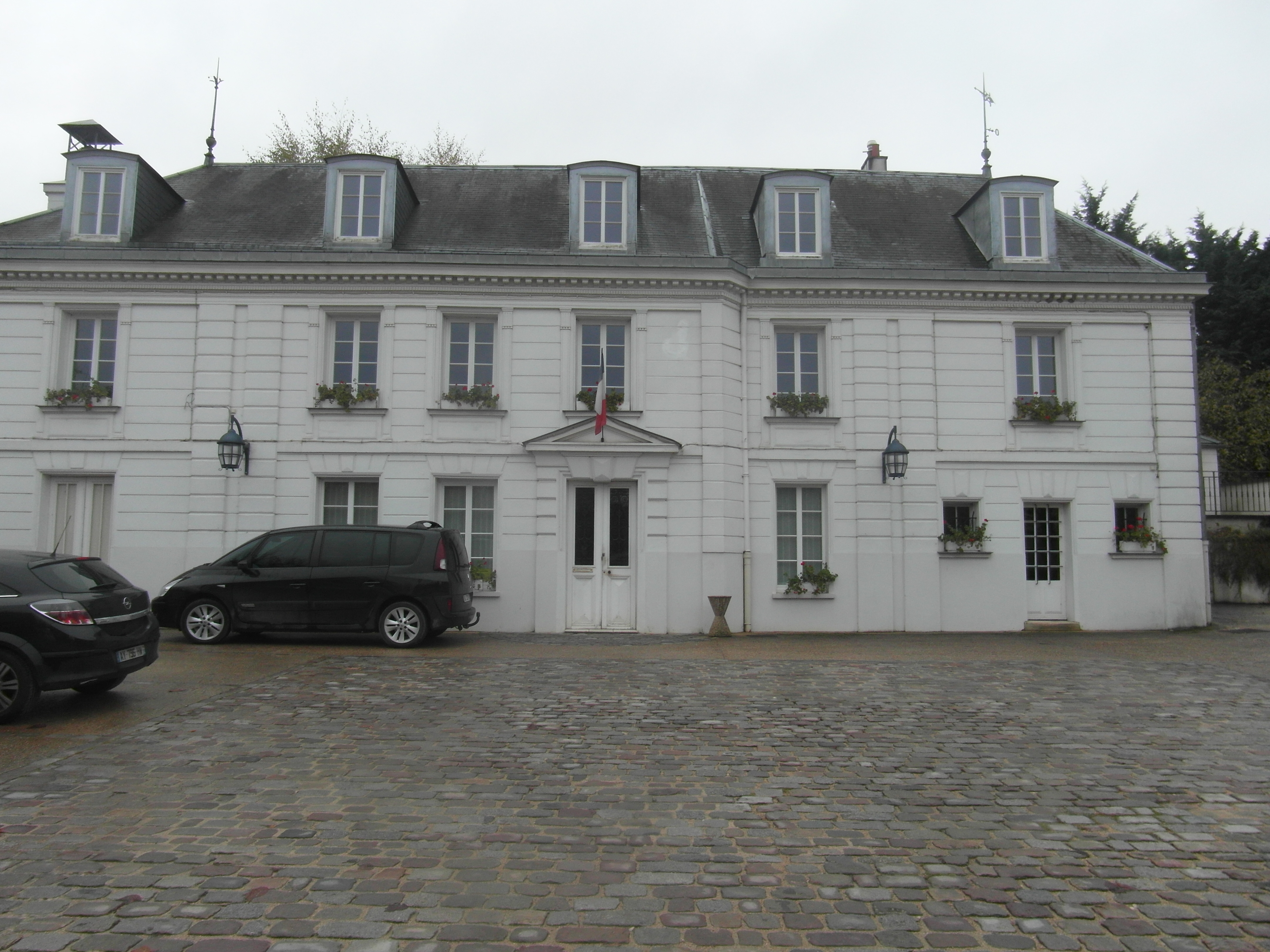 Mairie de Férolles-Attily (Seine-et-Marne)